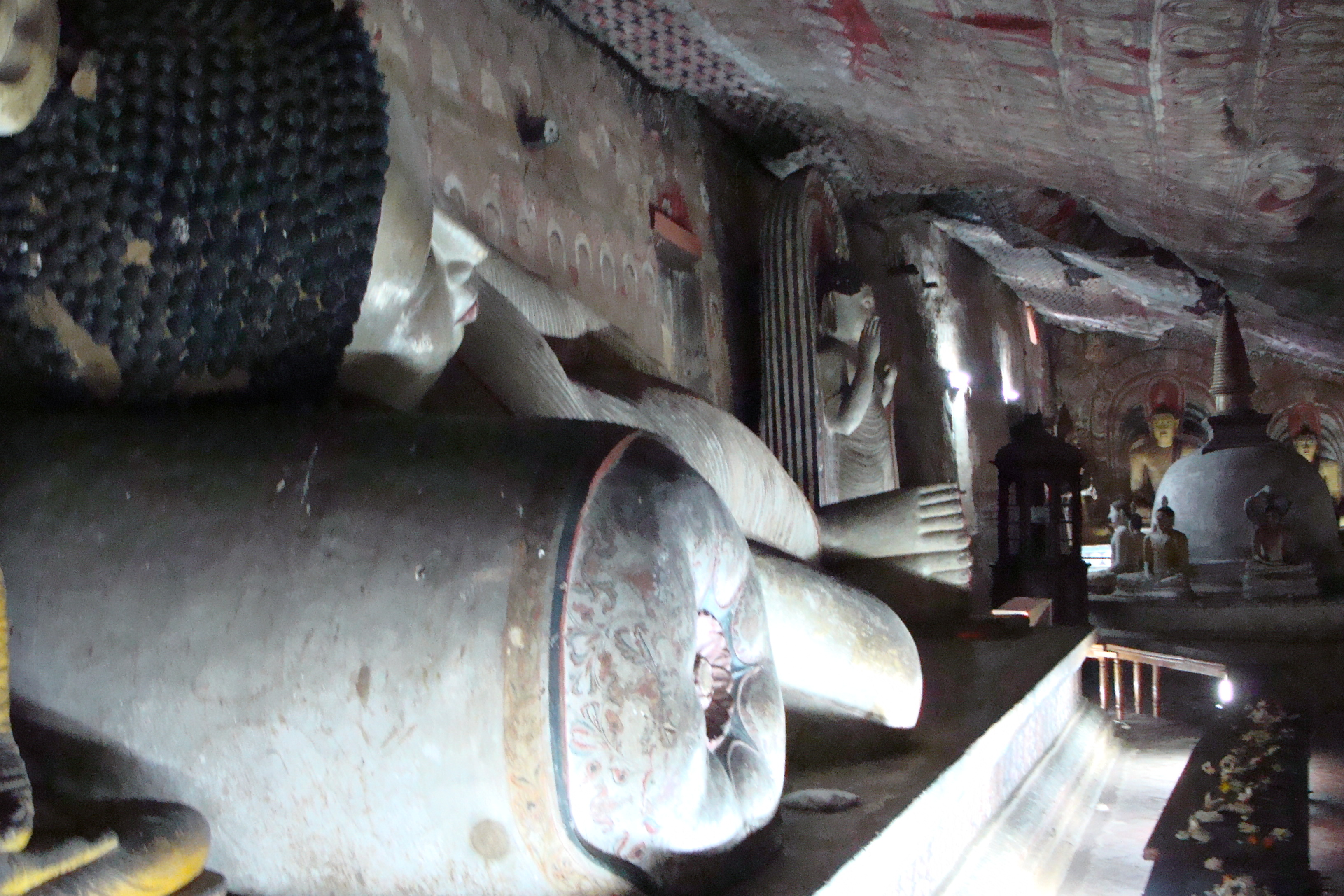 Sri Lanka - Golden tample off Dambula - Boudha couché